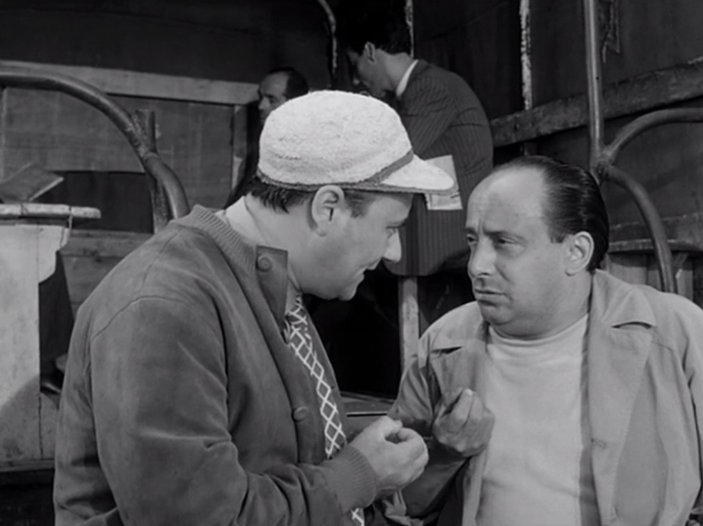 Screenshot dal film Accadde al commissariato (1954)